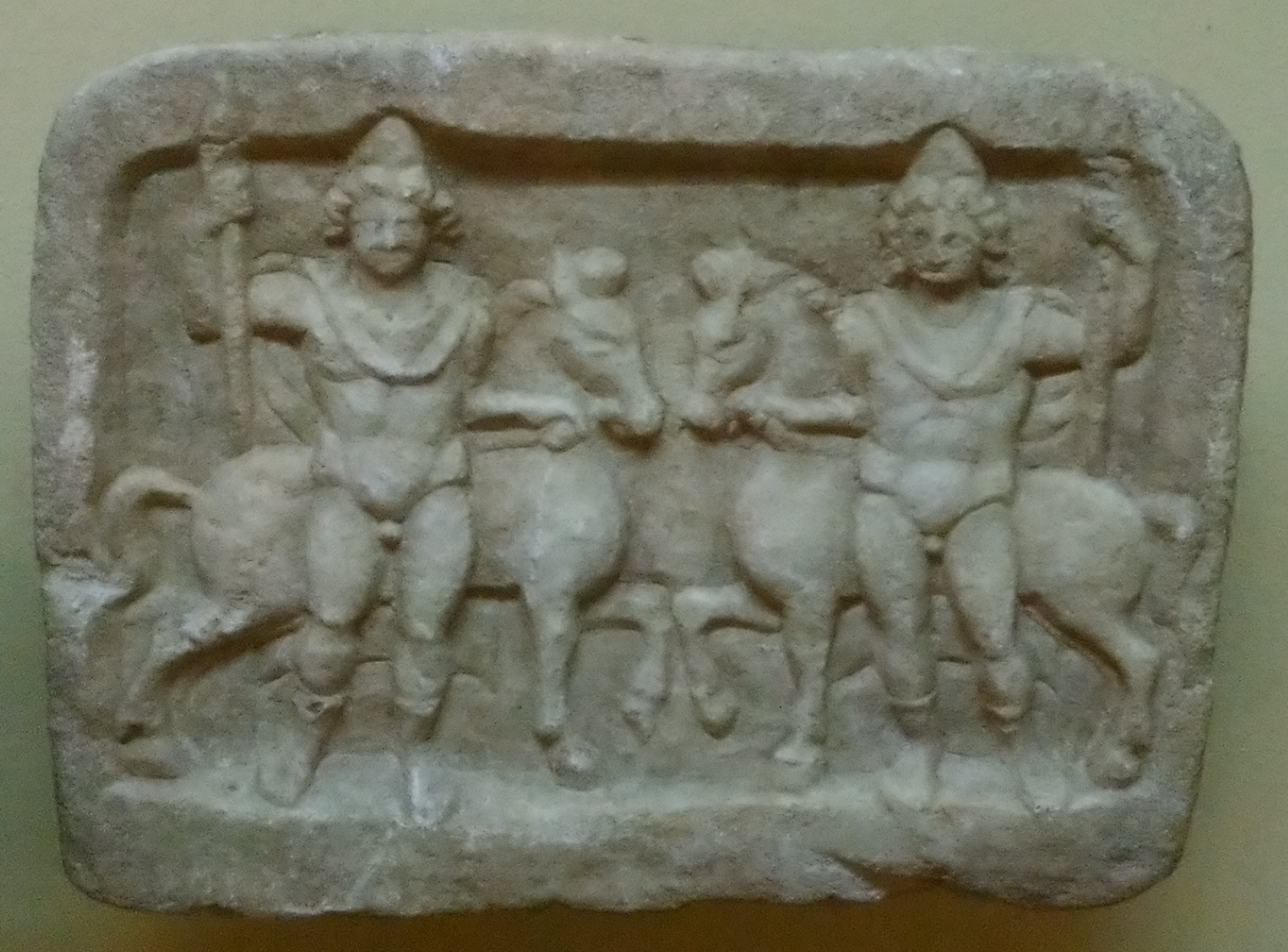 Исторически музей Пазарджик - Оброчна плочка на Диоскурите, Синитево